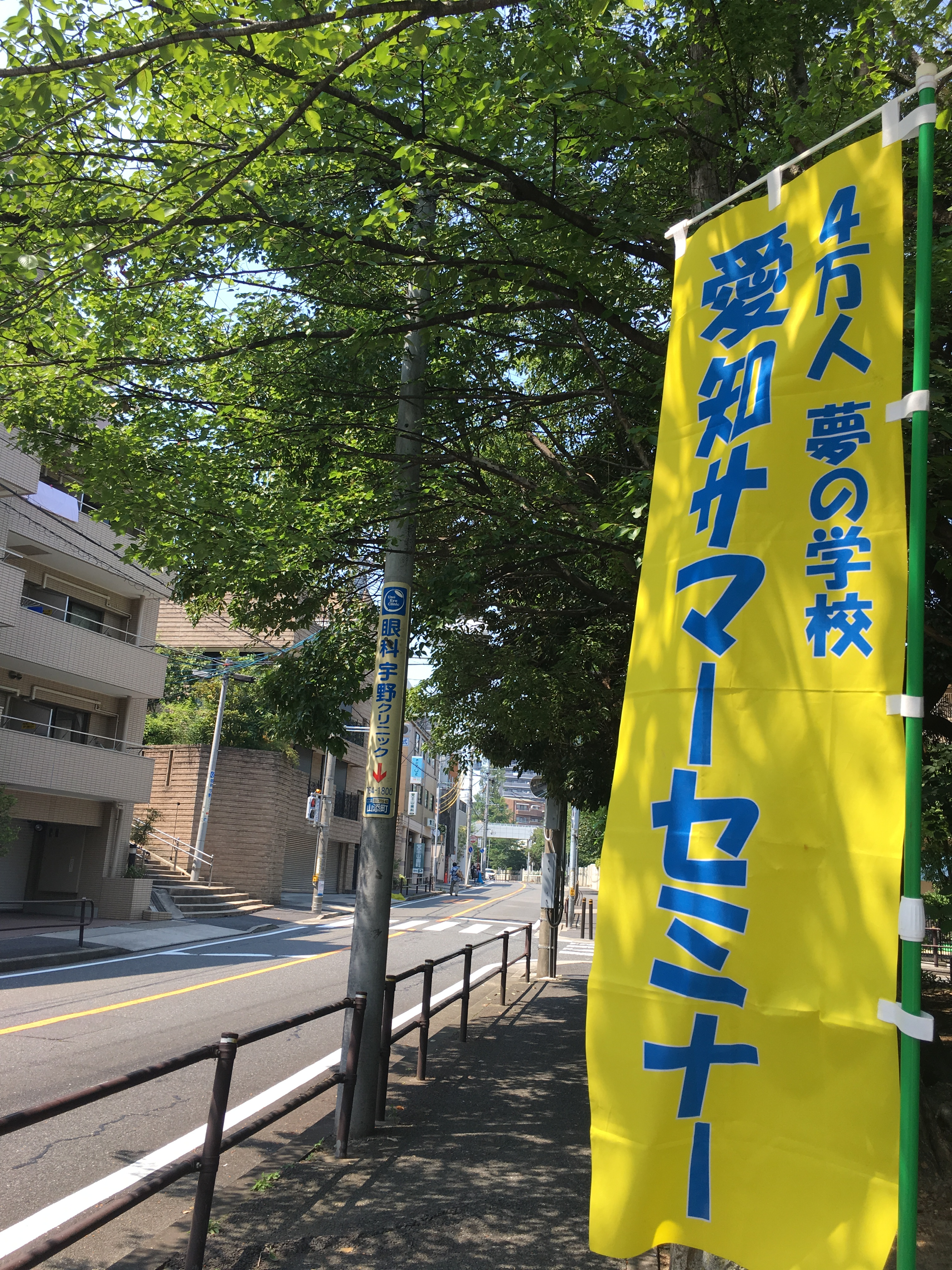 第30回サマーセミナーin椙山女学園高等学校